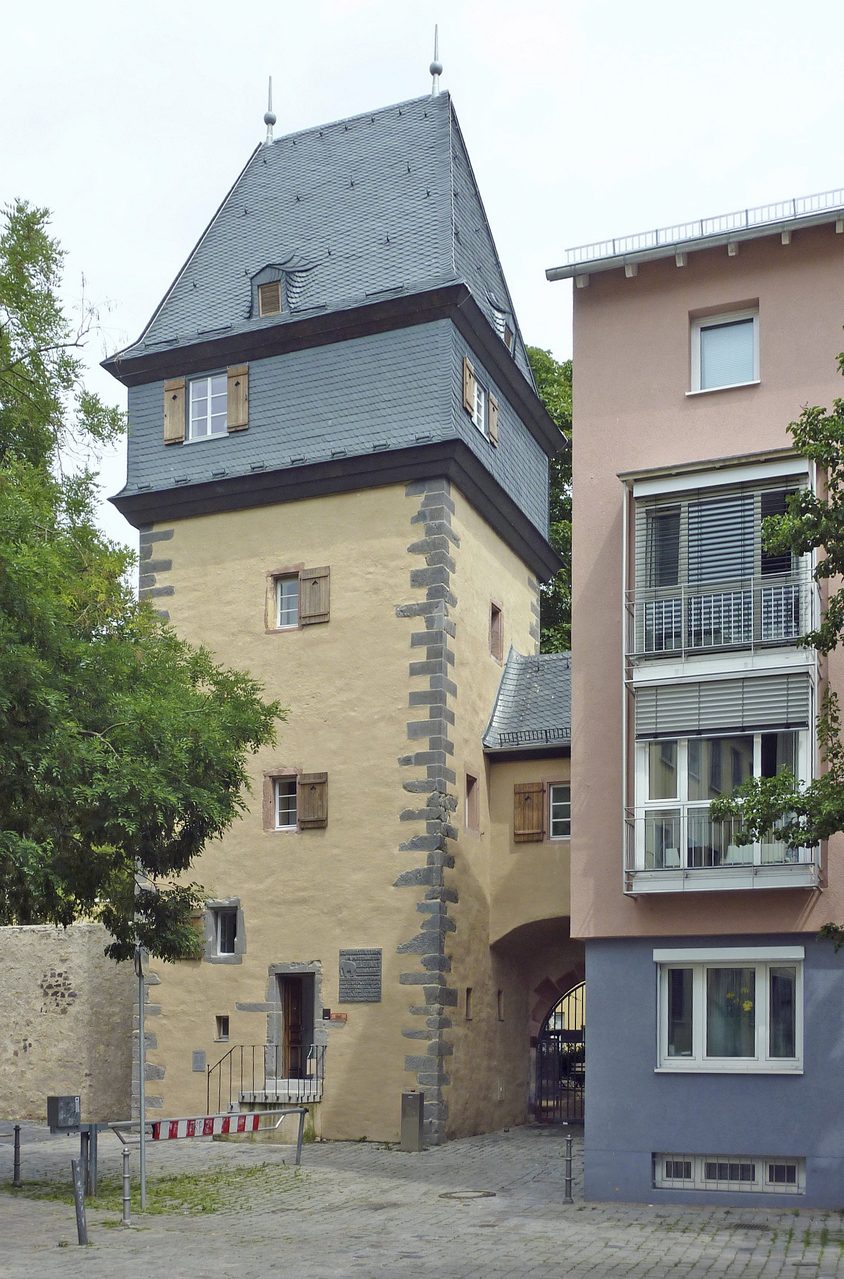 Frankfurt am Main, Stadtteil Sachsenhausen-Nord: Der Kuhhirtenturm, auch „Elefant“ genannt, wurde um das Jahr 1490 erbaut. Er ist der einzige erhalten gebliebene Wehrturm des südmainischen Teils der Frankfurter Stadtbefestigung. Von 1923 bis 1927 wohnte der Komponist Paul Hindemith zeitweilig im Obergeschoss des Kuhhirtenturms. Das Bauwerk wurde 1943 im Zweiten Weltkrieg schwer beschädigt und im Jahr 1957 wieder aufgebaut. Das Foto zeigt eine Totale des Turms von Südosten